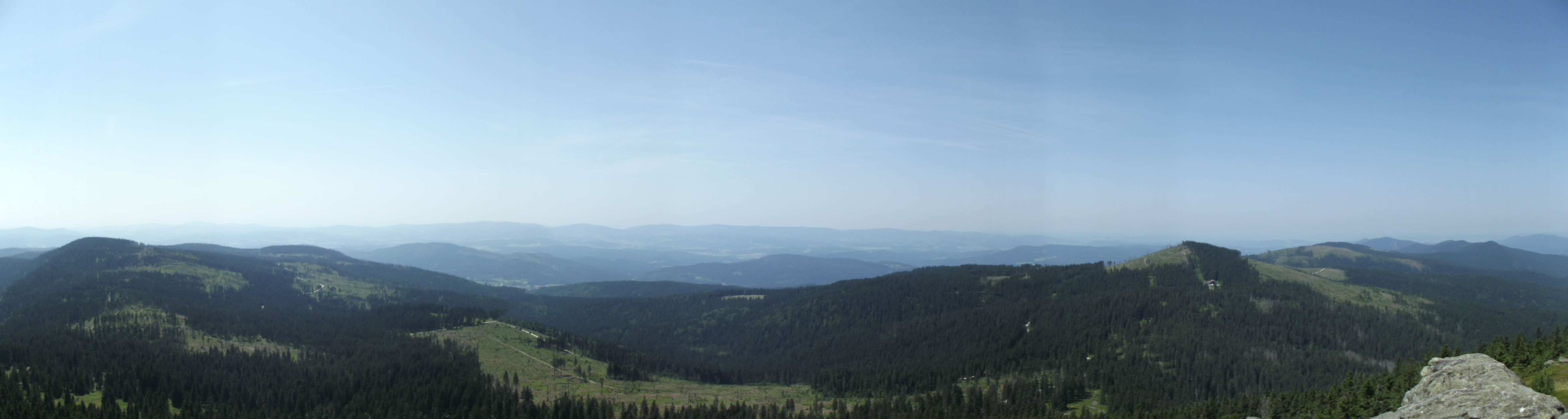 Panoramatická fotografie z pohoří Velký Javor (německy "Großer Arber").